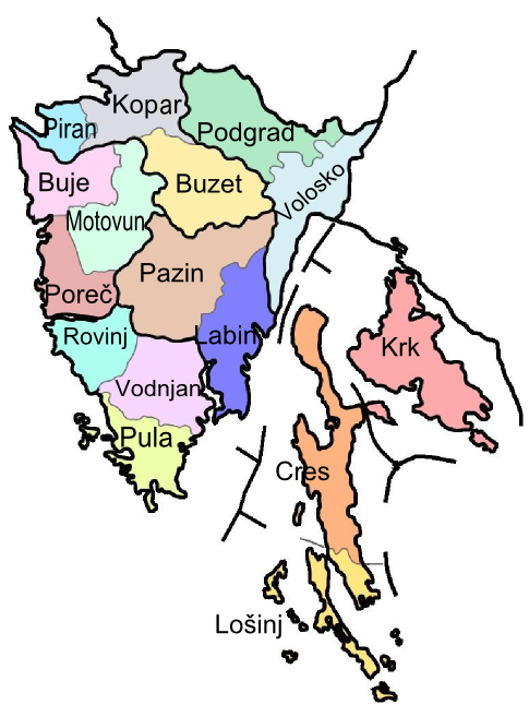 Sudski okruzi i distrikti (njem. bezirke) u Istri, 1849-1918